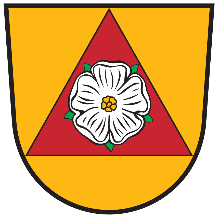 Wappen von Rosegg